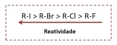 fila de Reatividades dos haletos de alquila